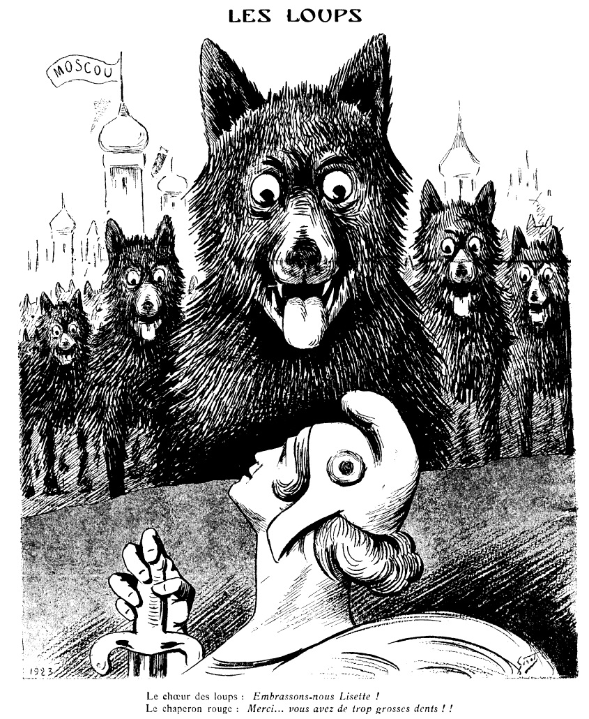 "Les Loups".